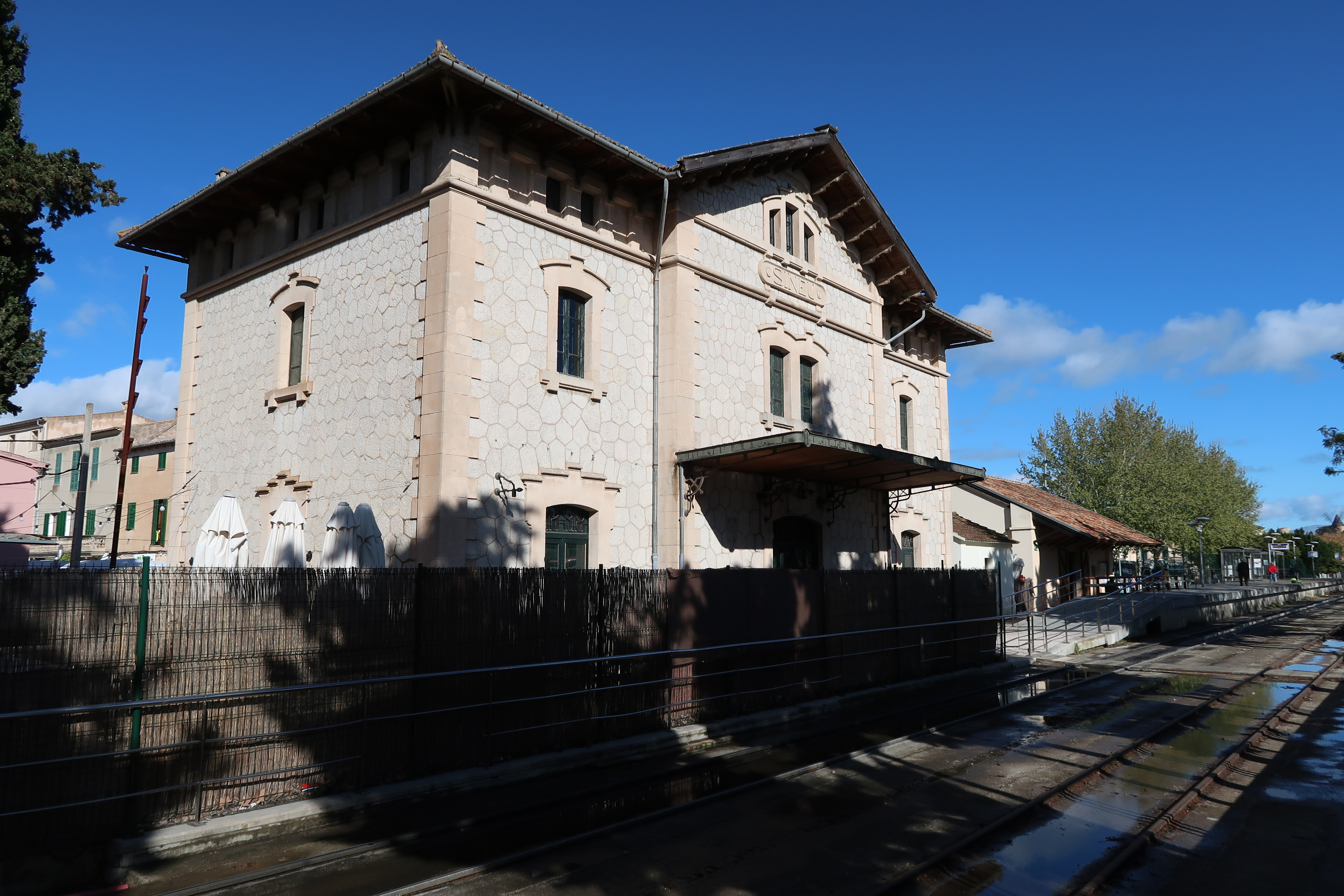 Spanien (E) - Balearische Inseln (IB) - Mallorca - Sinéu: Bahnhofsgebäude